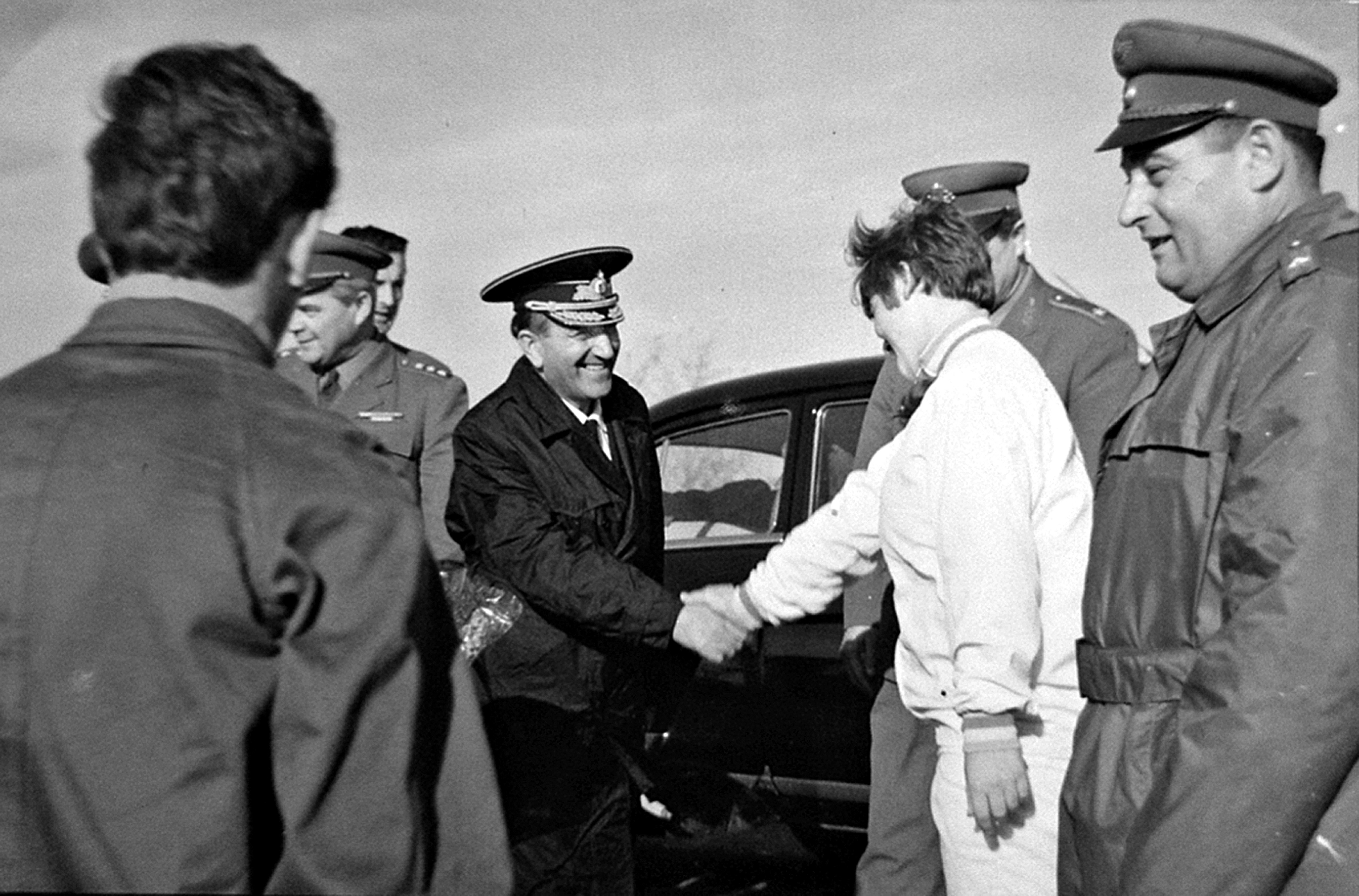 Azərbaycanın ilk kontr-admiralı Cəlil Cavadov